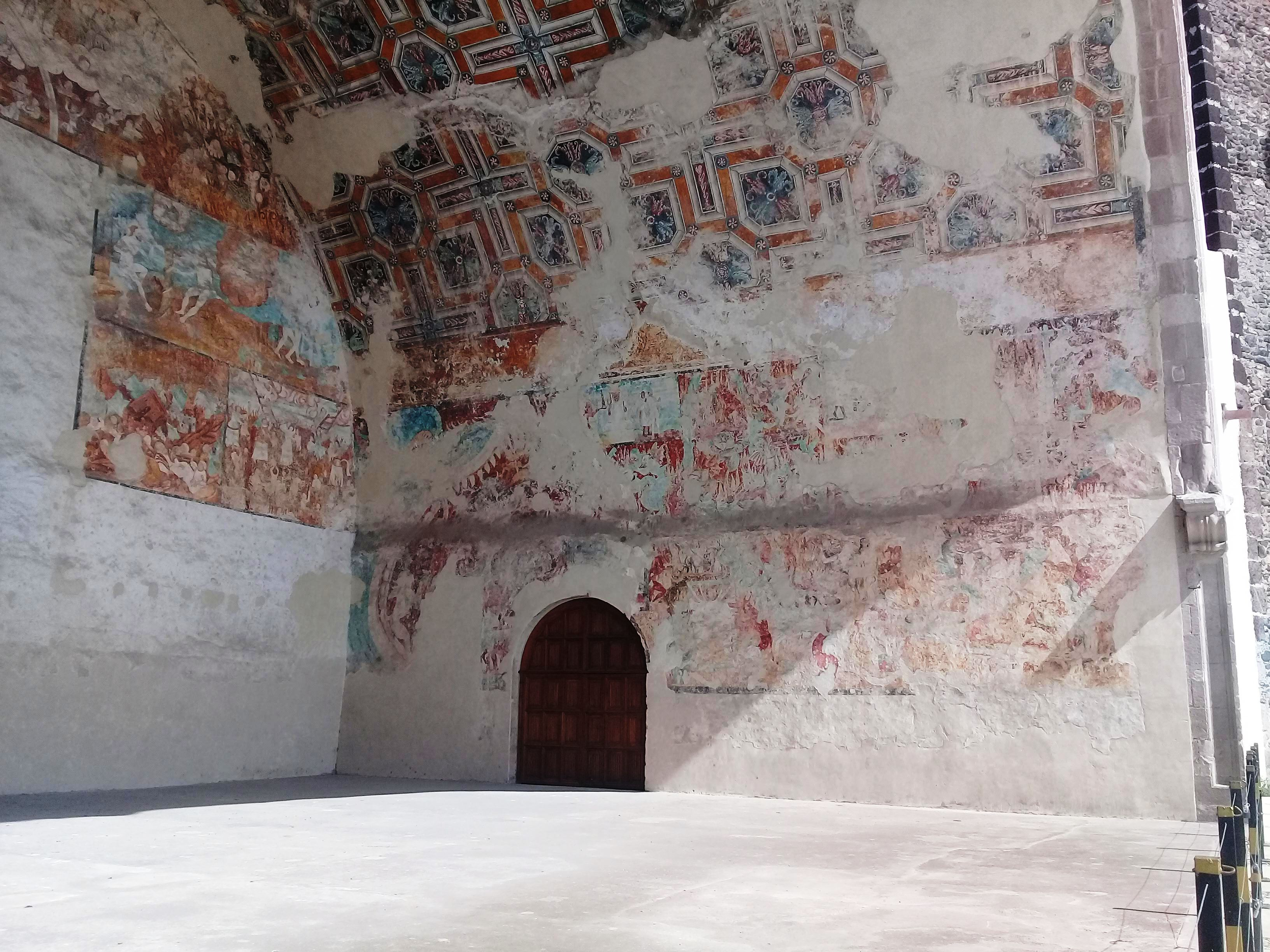 Templo y exconvento de San Nicolás de Tolentino (Actopan).